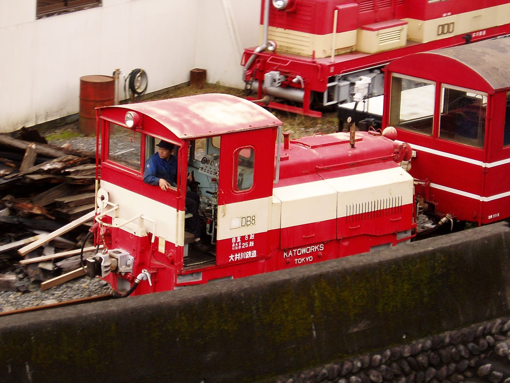 Oigawa Railway type DB8. at Kawane-Ryogoku Dept.